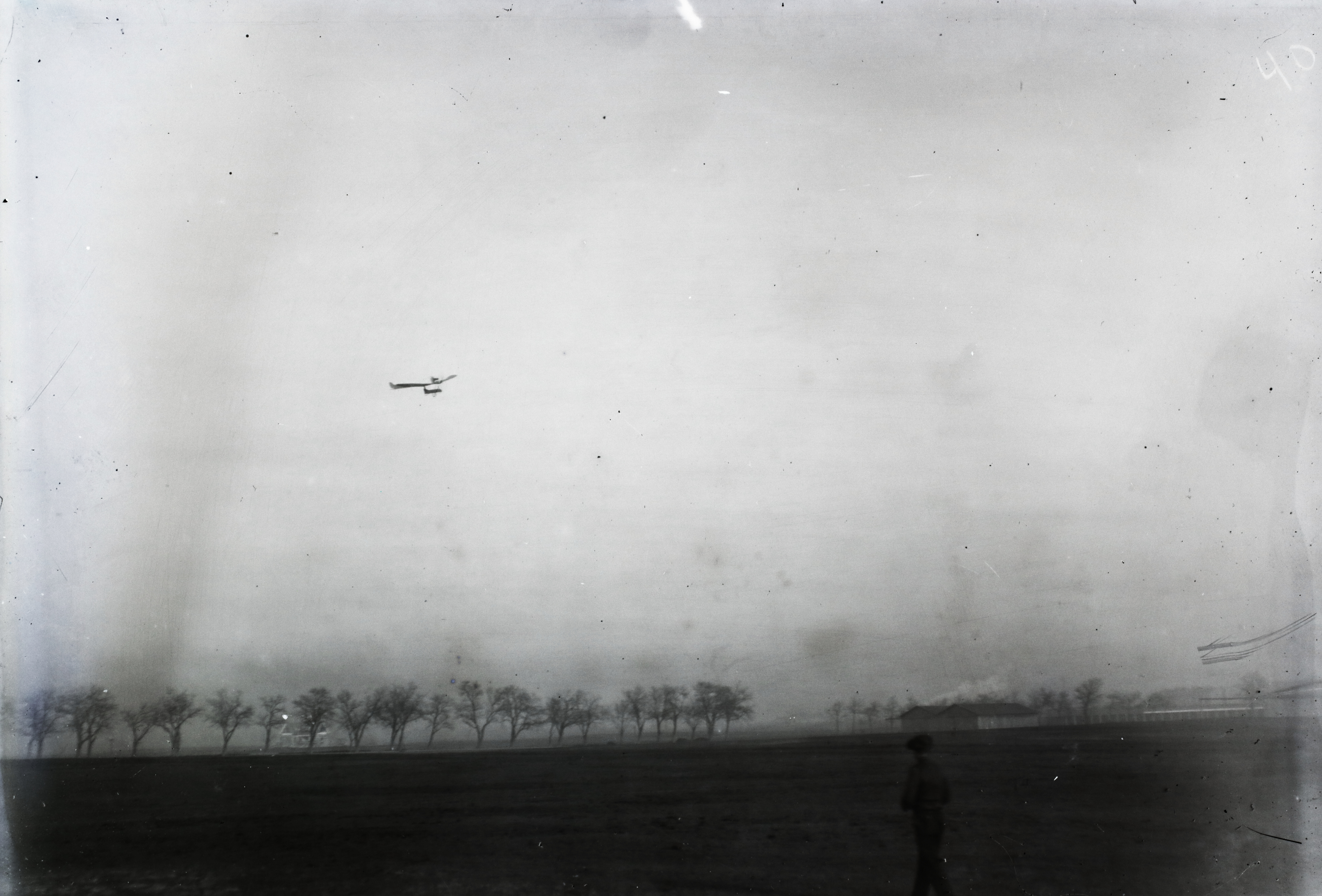 Székely Mihály Parasol (napernyő) típusú alsóüléses repülőgépe, amellyel 1913. VIII 20-i versenyen lezuhant. Leltári jelzet: 302.